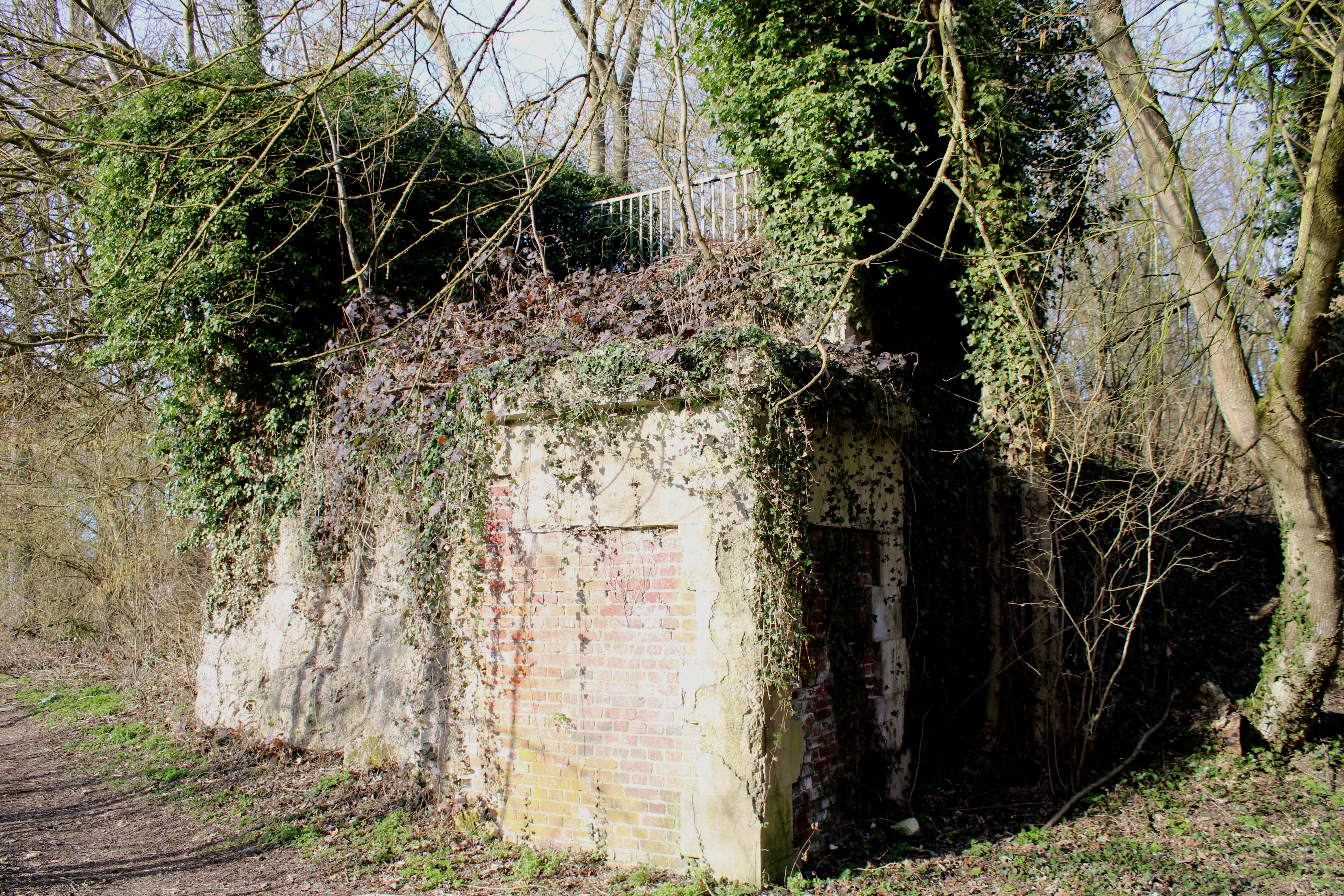 Vestige du pont qui traversait la Somme.